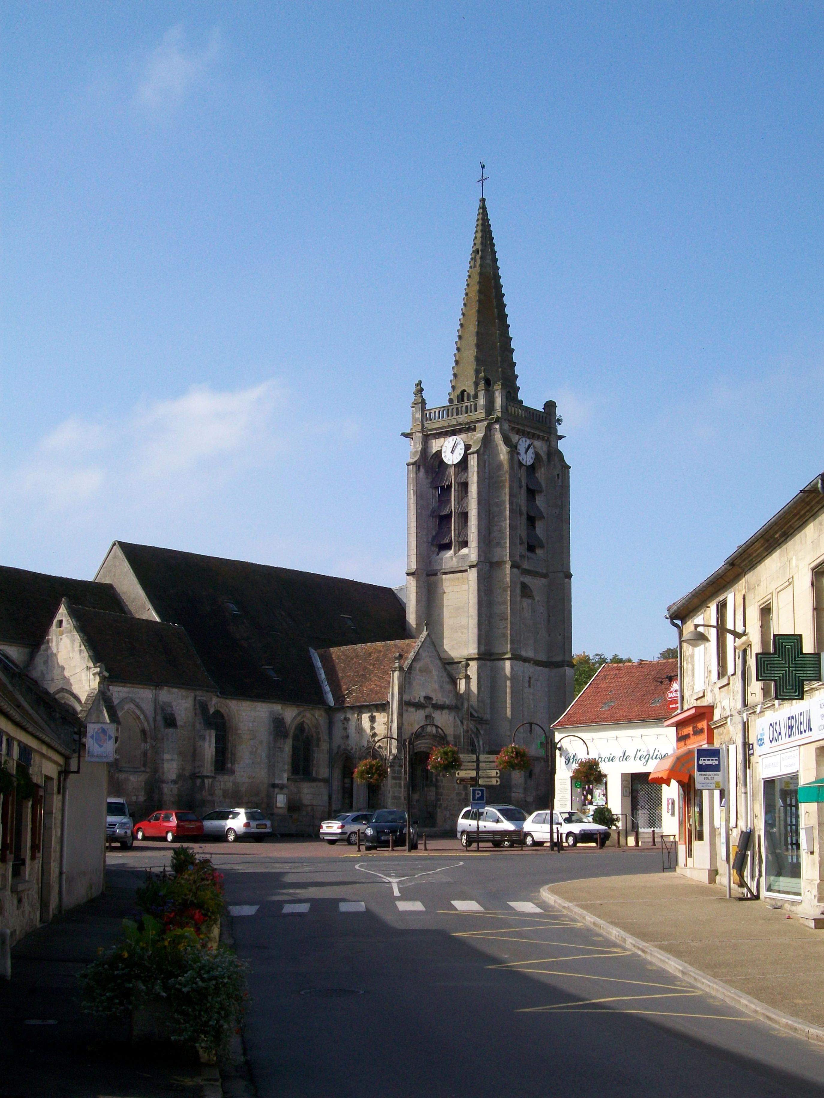 L'église Saint-Honoré, vue depuis la rue Victor-Hugo.